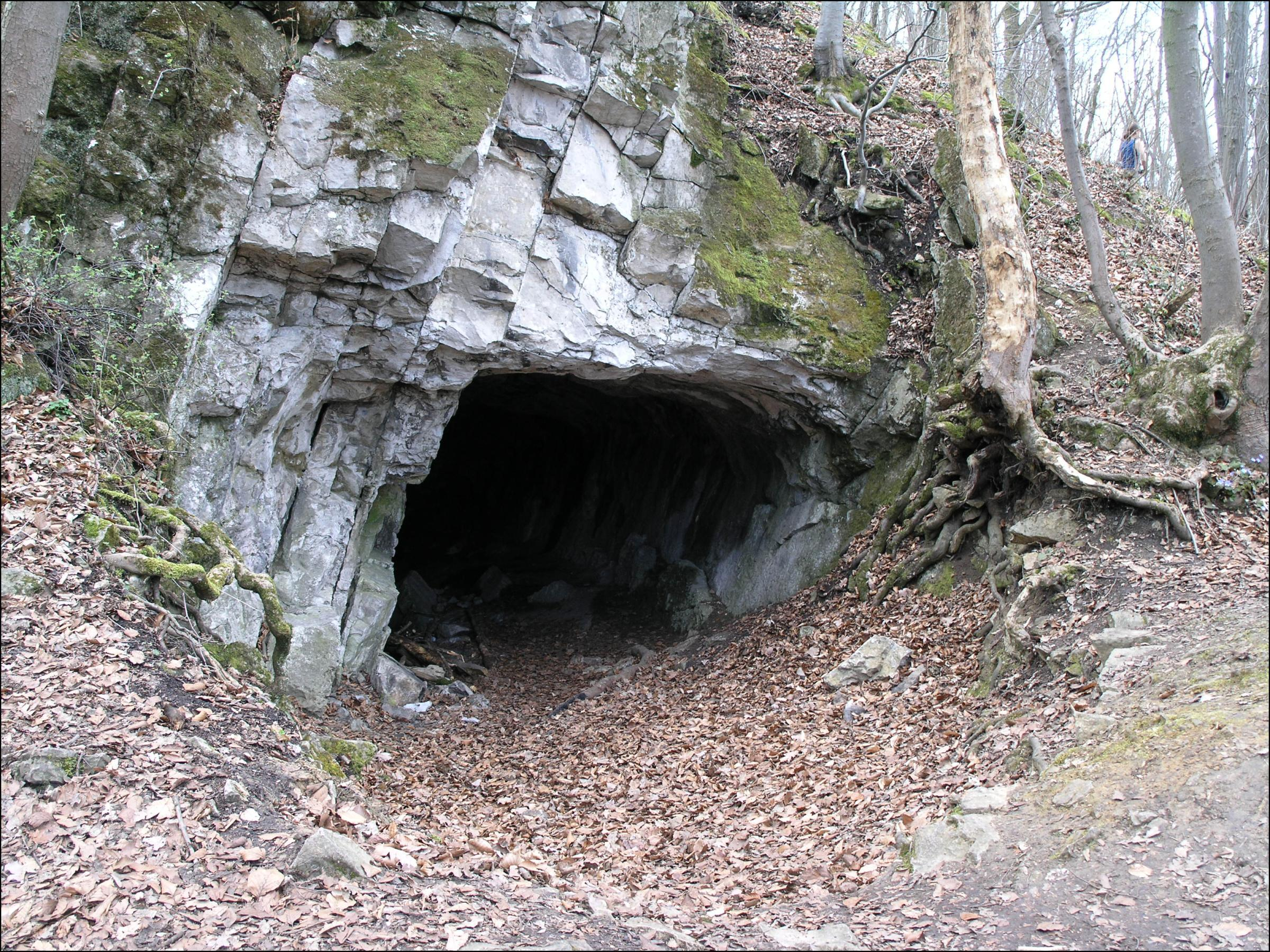 Přírodní rezervace Koda - Kodská jeskyně